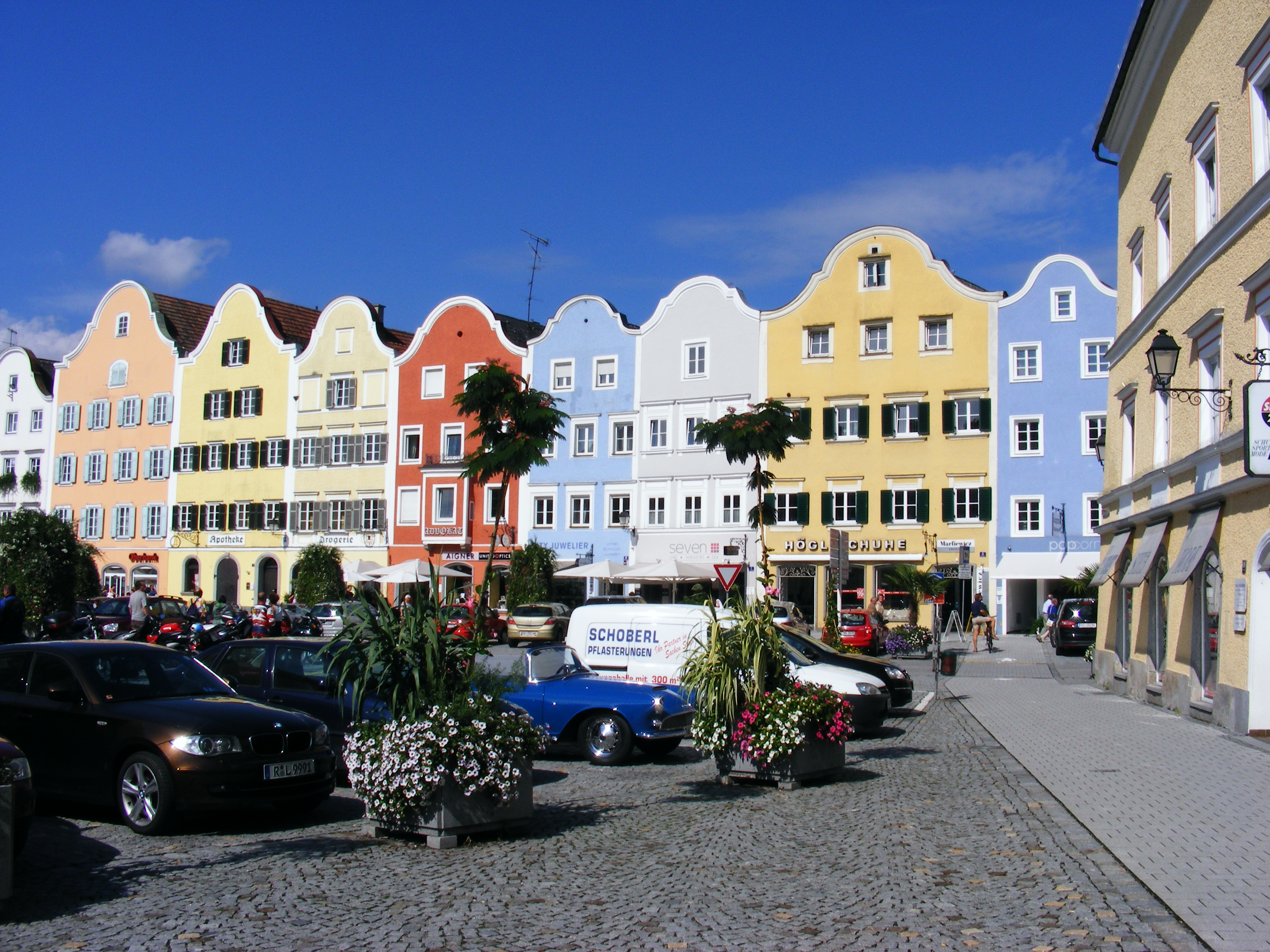 A-4780 Schärding (Oberösterreich) Silberzeile